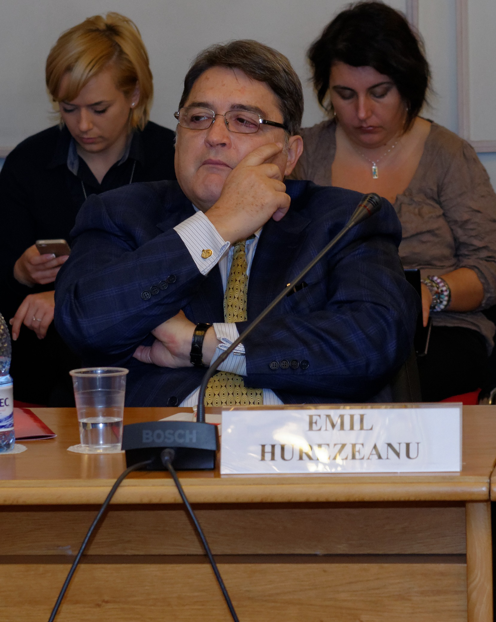 Emil Hurezeanu la Atelierele Viitorului - Editia a III-a, Palatul Parlamentului